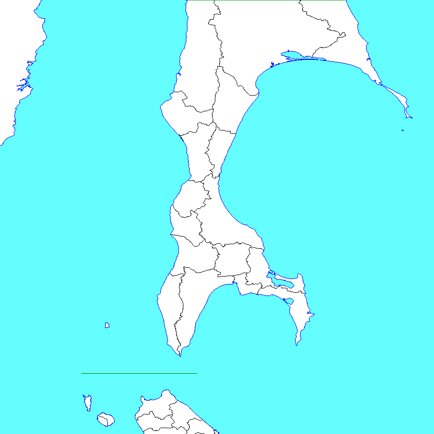 樺太庁の白地図(1945年までに行政区画を除く)